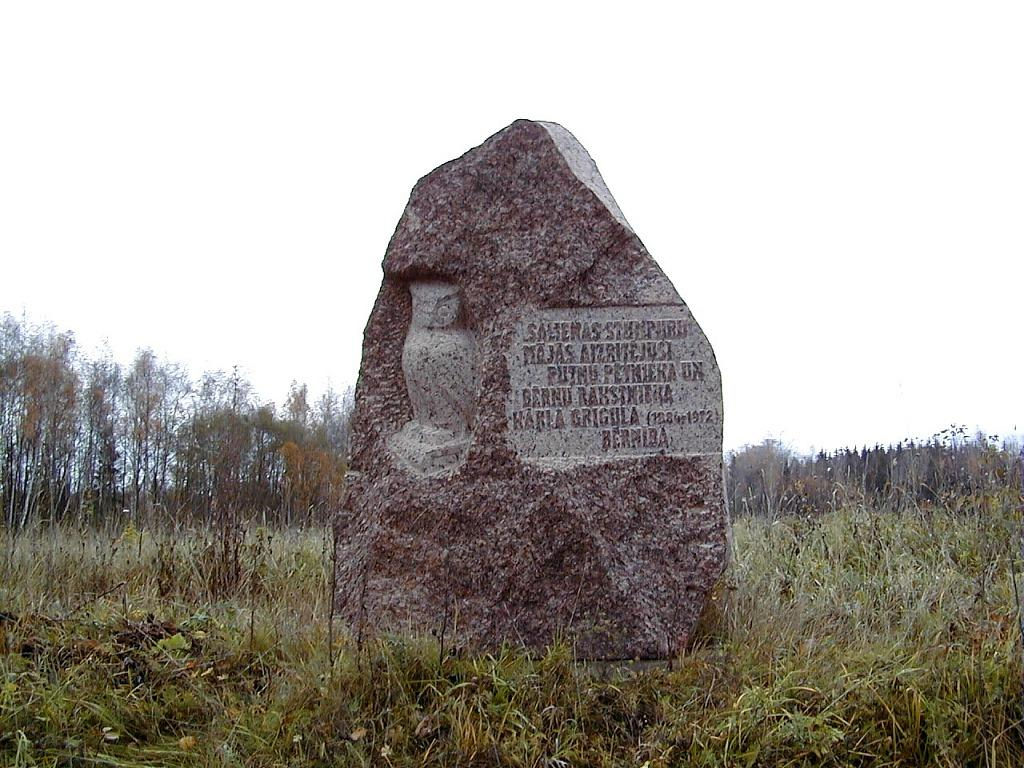 Saliena, K. Griguļa piemiņas akmens 2000-10-15